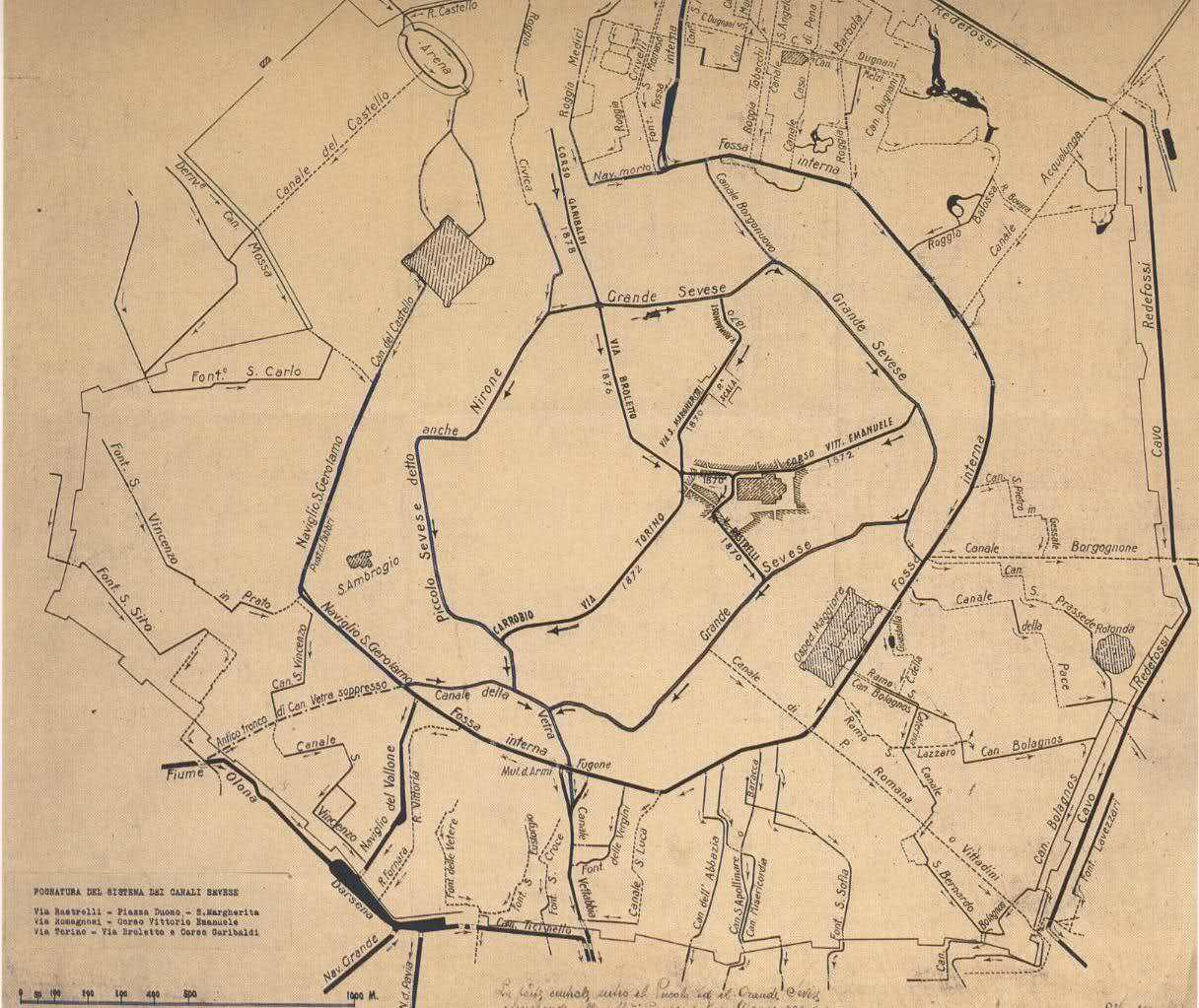 Mappa idrografica di Milano del 1870 con segnati i corsi d'acqua, sia naturali che artificiali, che attraversavano la città